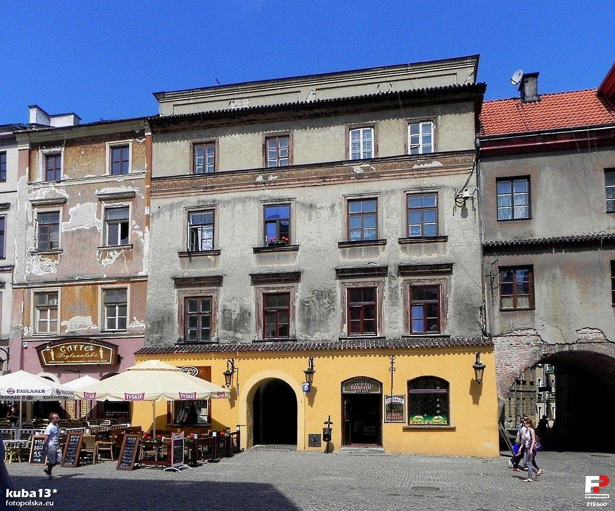 Kamienica - Rynek 5. Po prawej Brama Rybna i ulica Rybna.